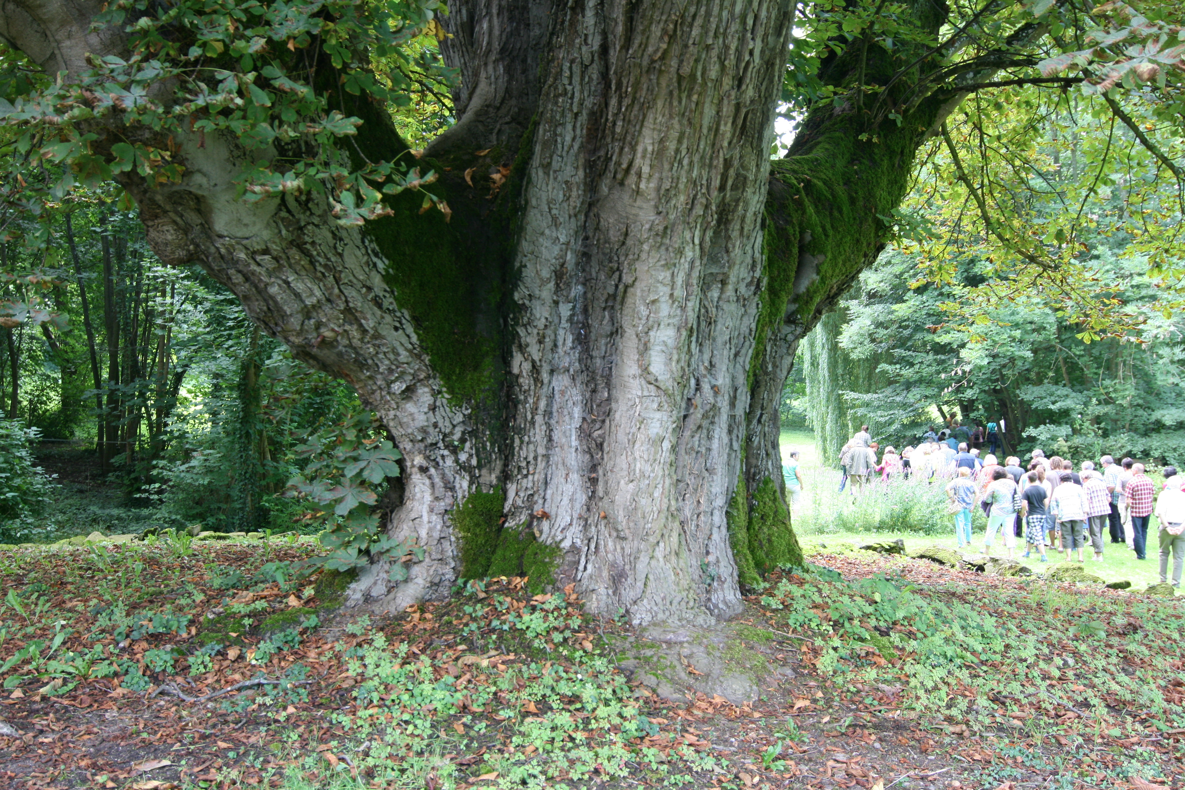 Alte Rosskastanie im Schlosspark von Schloss Weiler in Weiler (Obersulm), auch als Schlosskastanie bekannt